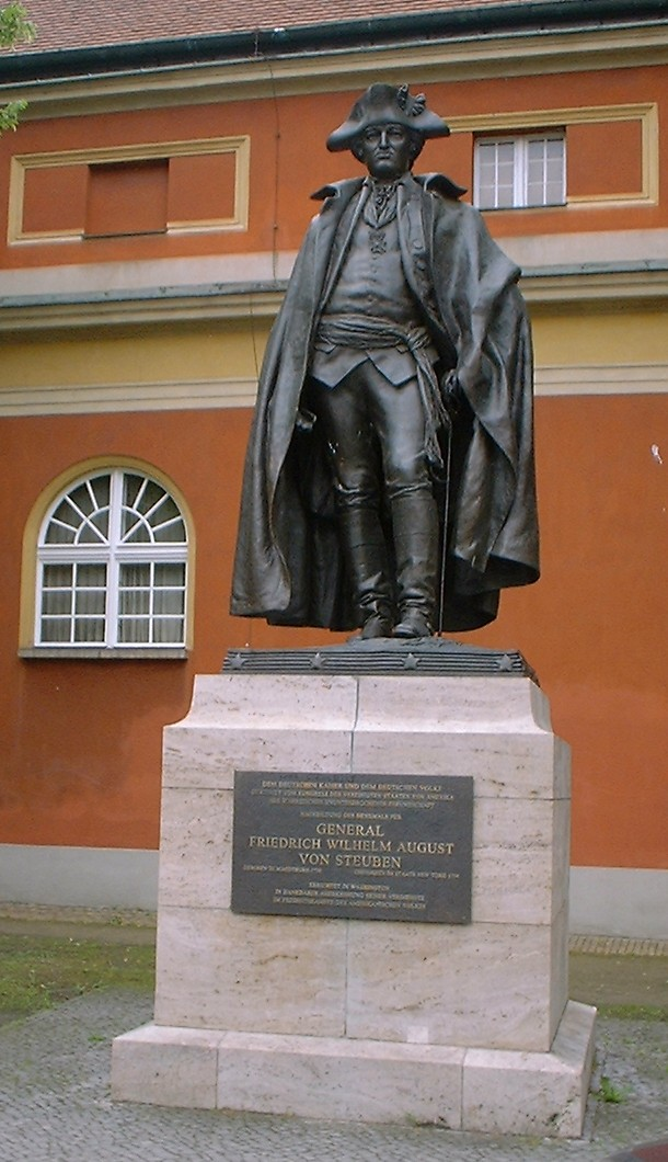 Potsdam - neue Kopie Denkmal General von Steuben